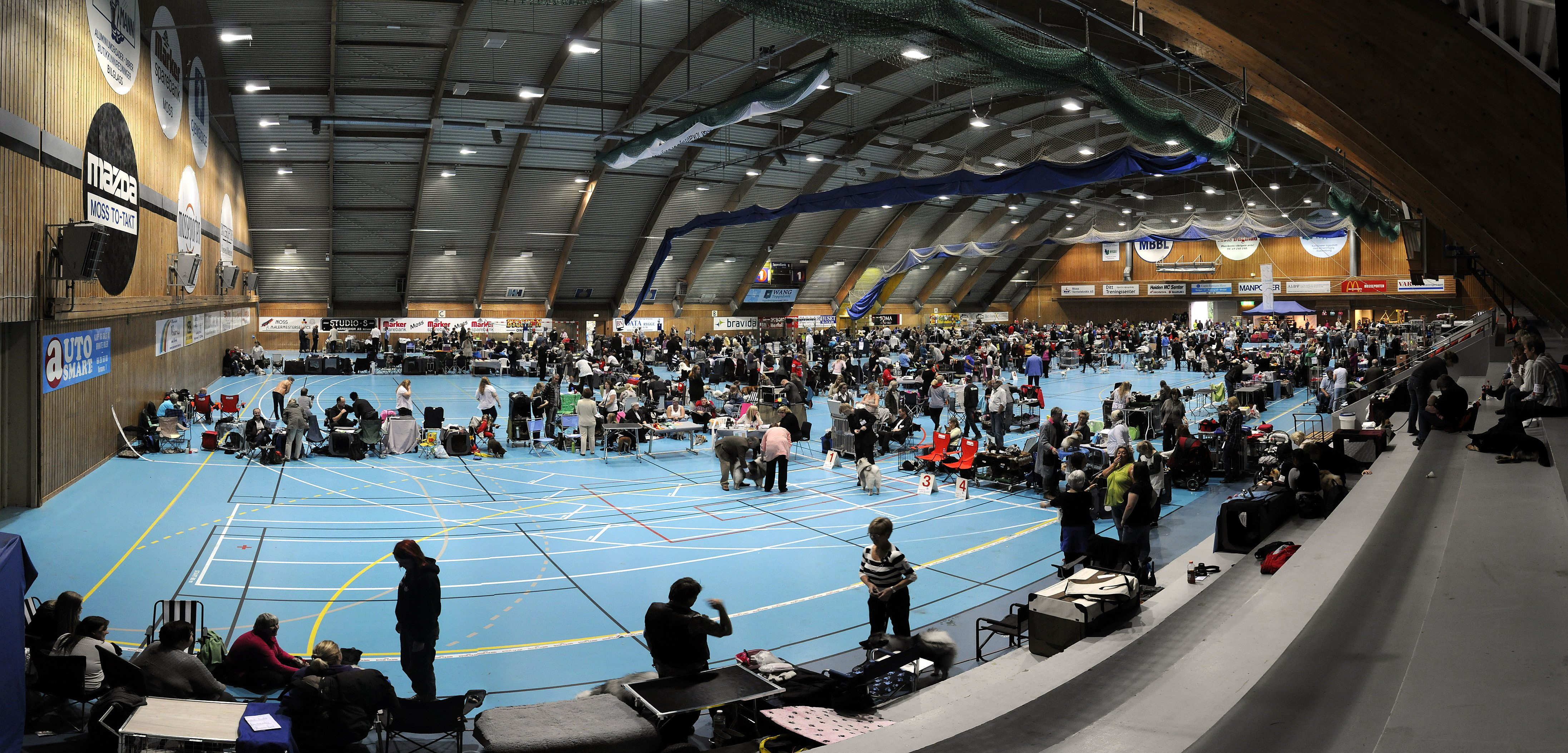 Hundeutstilling i Mossehallen i regi av Moss og Omegn Hundeklubb